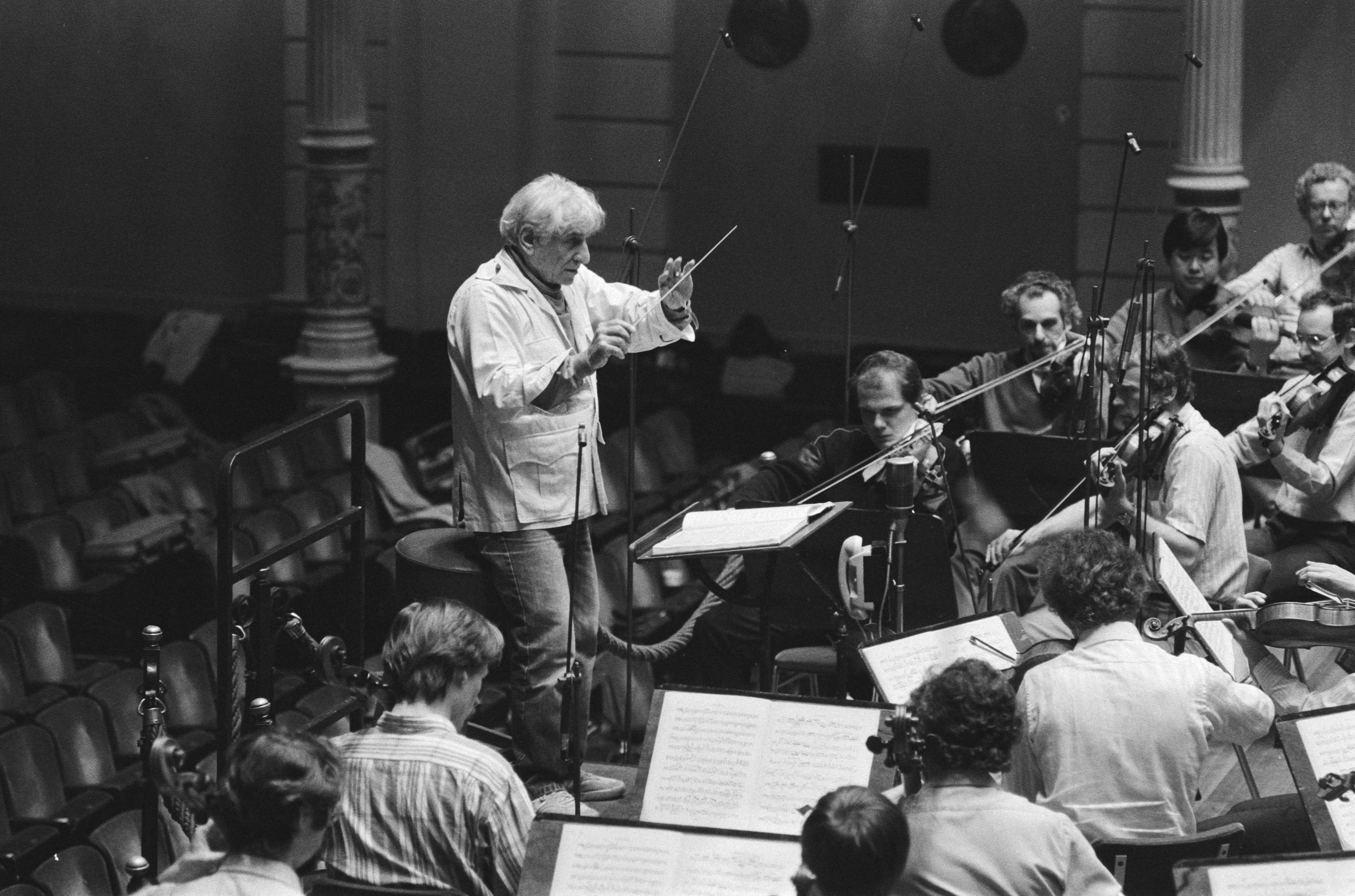 Collectie / Archief : Fotocollectie Anefo Reportage / Serie : [ onbekend ] Beschrijving : Holland Festival; dirigent Leonard Bernstein zal het met het Concertgebouworkest openen, Bernstein aan het oefenen met het orkest, rechts van hem Jaap van Zweden / Datum : 30 mei 1985 Trefwoorden : dirigenten, festivals, openingen, orkesten Persoonsnaam : Bernstein Leonard Instellingsnaam : Concertgebouworkest, Holland Festival Fotograaf : Vollebregt, Sjakkelien / Anefo Auteursrechthebbende : Nationaal Archief Materiaalsoort : Negatief (zwart/wit) Nummer archiefinventaris : bekijk toegang 2.24.01.05 Bestanddeelnummer : 933-3398